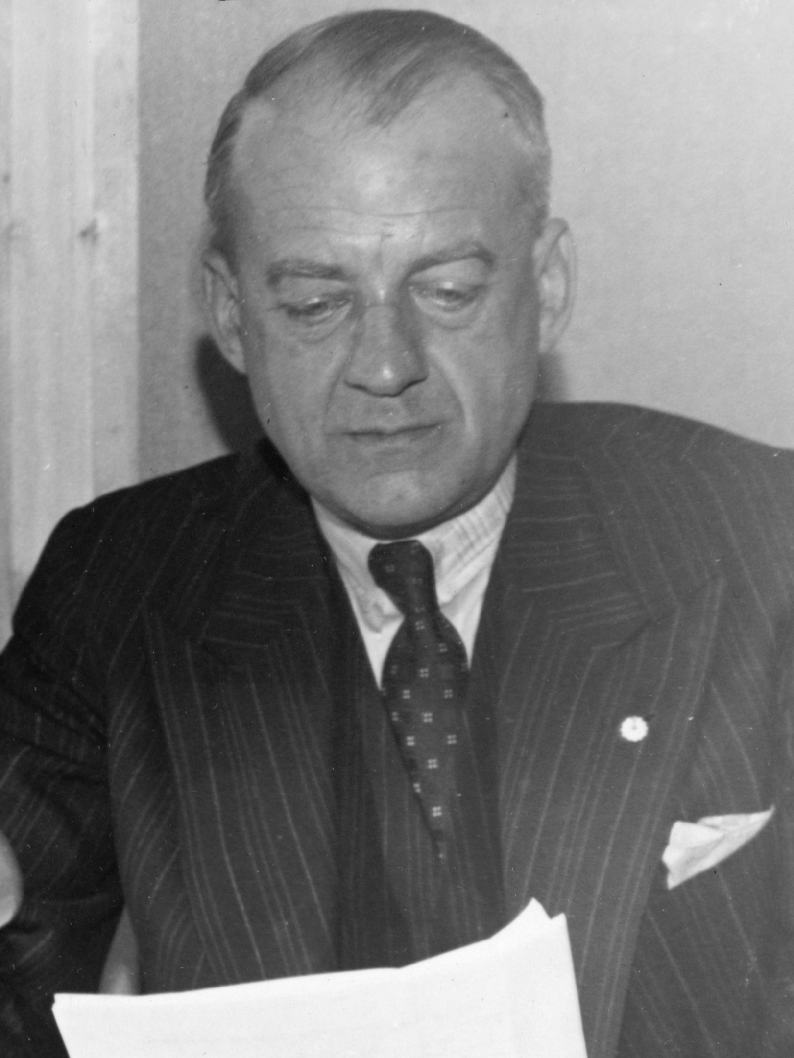 J. Meynen, minister van Oorlog, voor de radiomicrofoon 1945